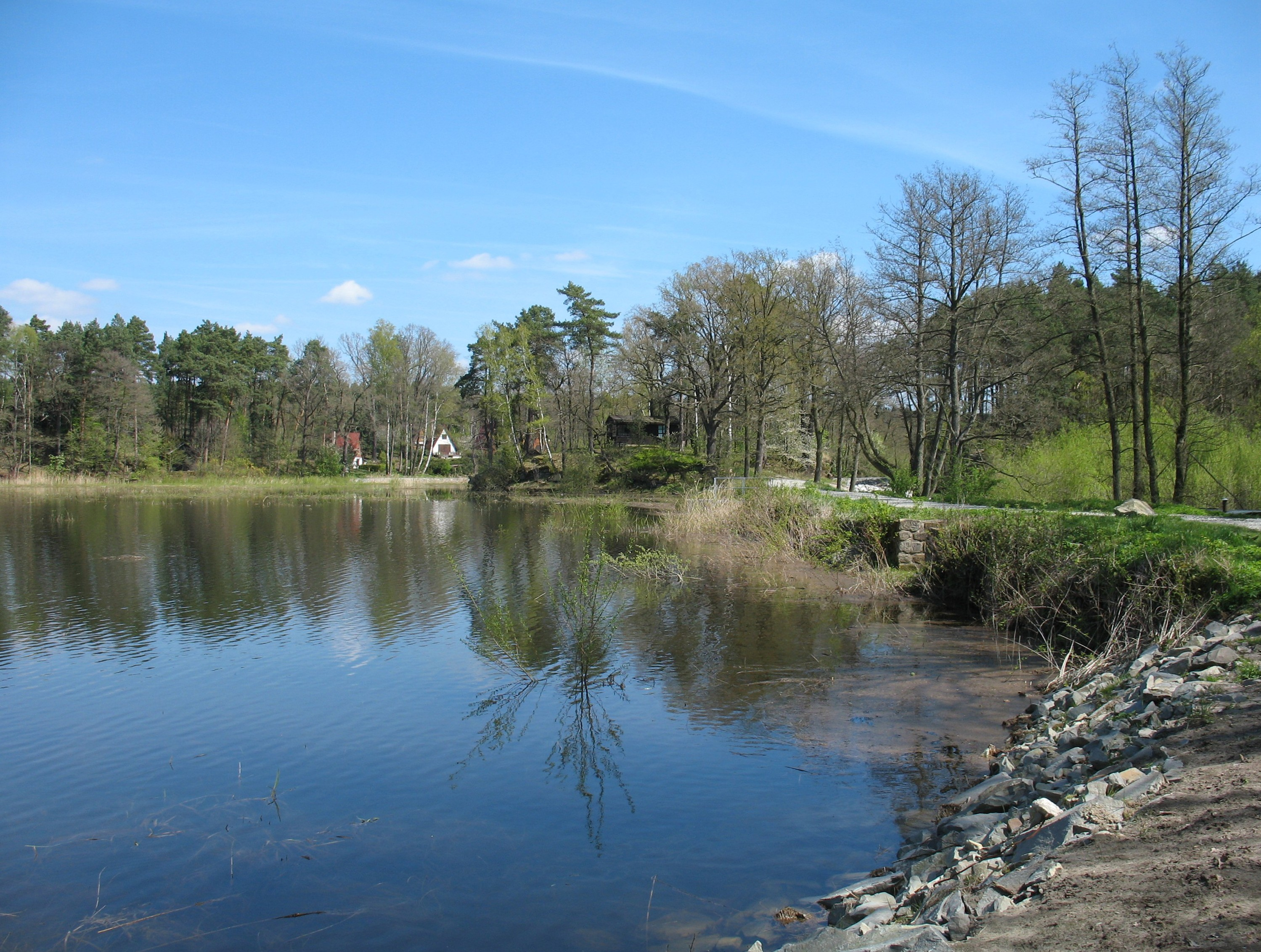 Hrázský rybník na hranici katastru Stvolínek a Holan